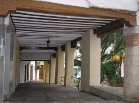 Portalillos